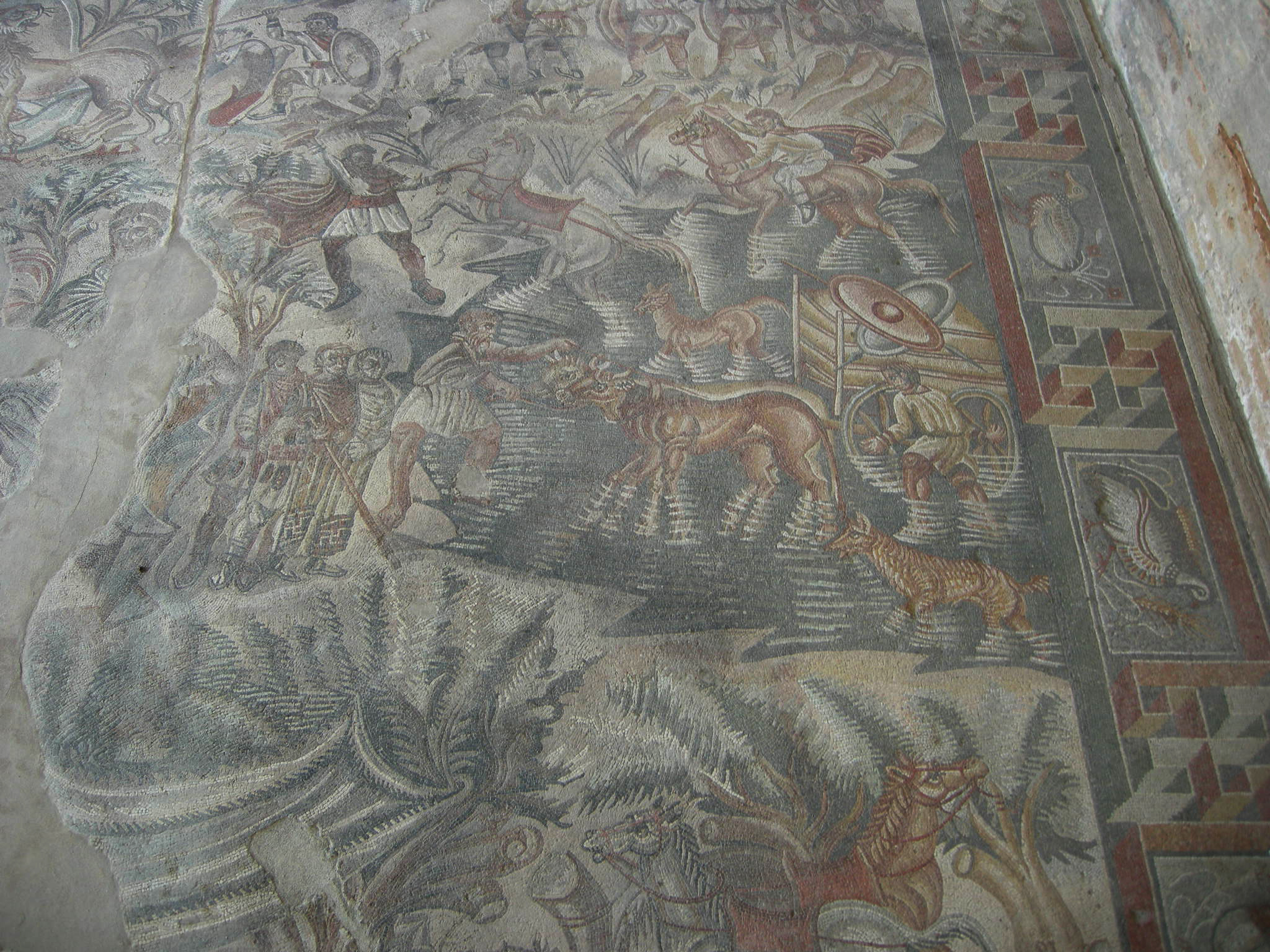 Villa Romana del Tellaro (Noto) - Hunt mosaic